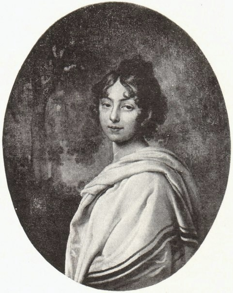 Графиня Мария Павловна Ожаровская, ур. Скавронская (1782—1857), в первом браке Пален.